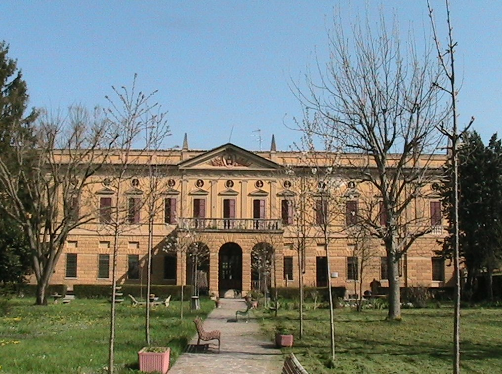 Vho (Piadena) - Villa Magio Trecchi